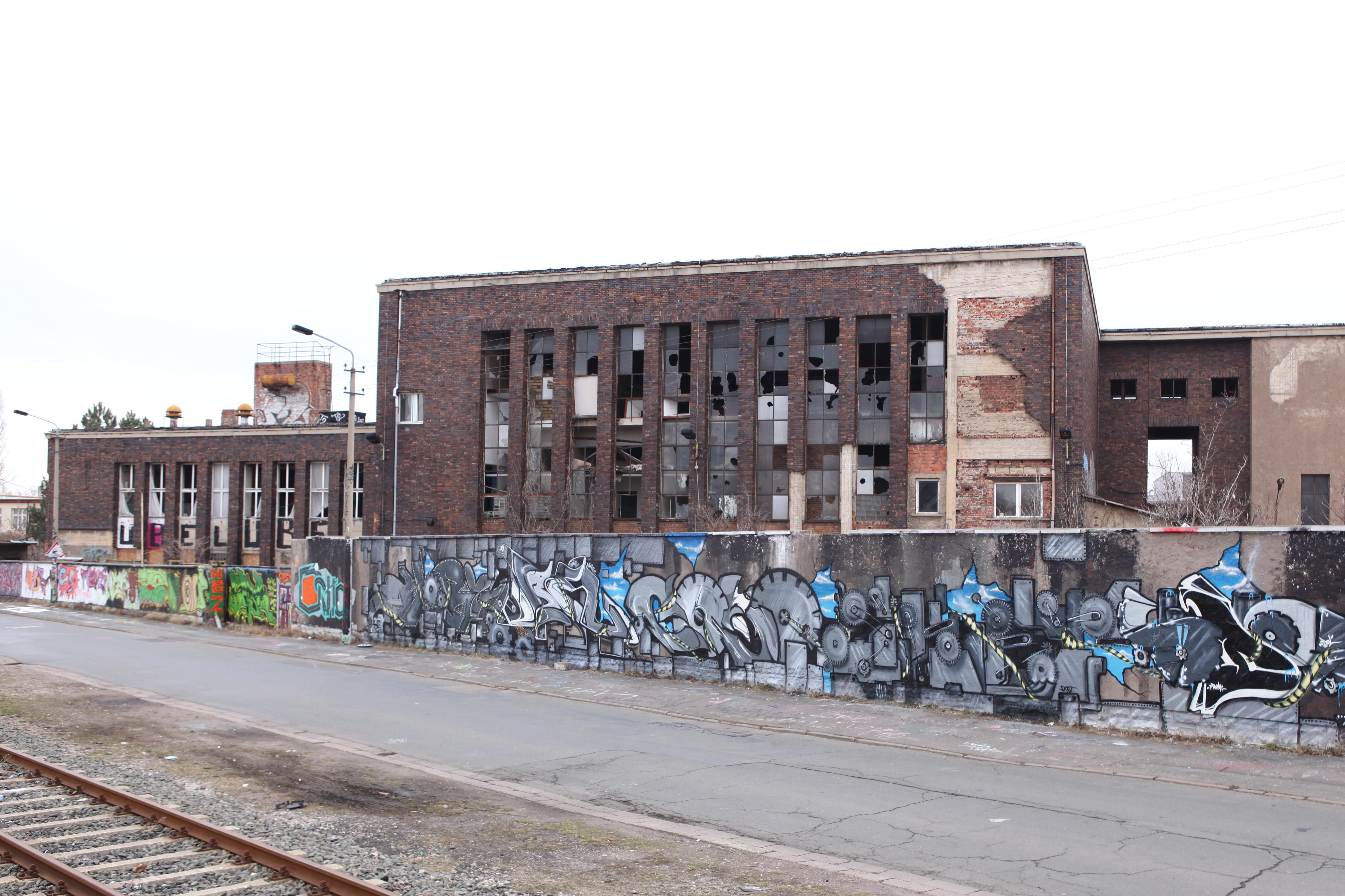 Baudenkmal (ehemaliges Heizwerk der Mitteldeutschen Metallwerke) - Hohenwindenstraße 17, Erfurt, Thüringen, Deutschland